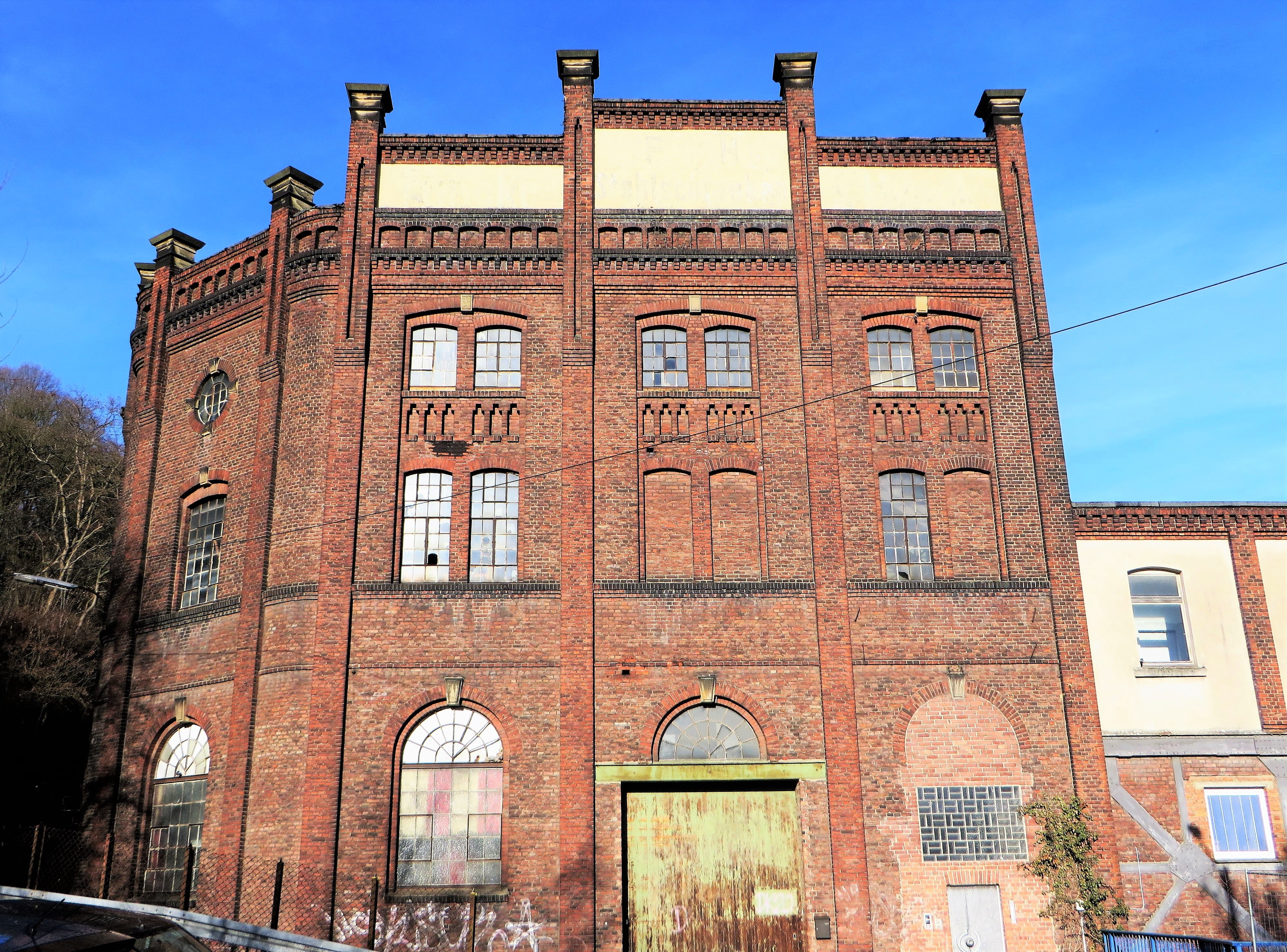 Denkmalgeschütztes Fabrikgebäude in Hagen, Plessenstraße 20, an der Ennepe gelegen. Ehemalige Schraubenfabrik und Gesenkschmiede Funcke & Hueck (gegründet 1844), im Jahre 1970 an die Firma Bauer & Schaurte (Neuss) verkauft und in den 1990er Jahren stillgelegt. This is a photograph of an architectural monument.